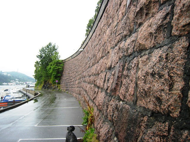 Fjæregranitten under Vesterveien